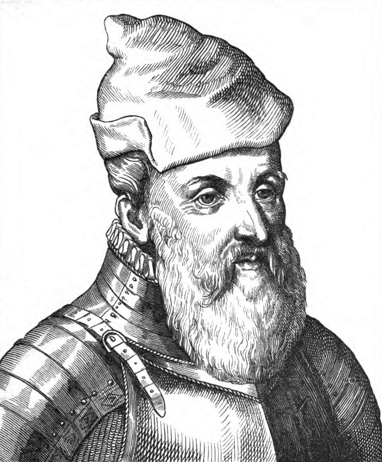 Konrad von Boyneburg (1494-1567), deutscher Landsknechtsführer